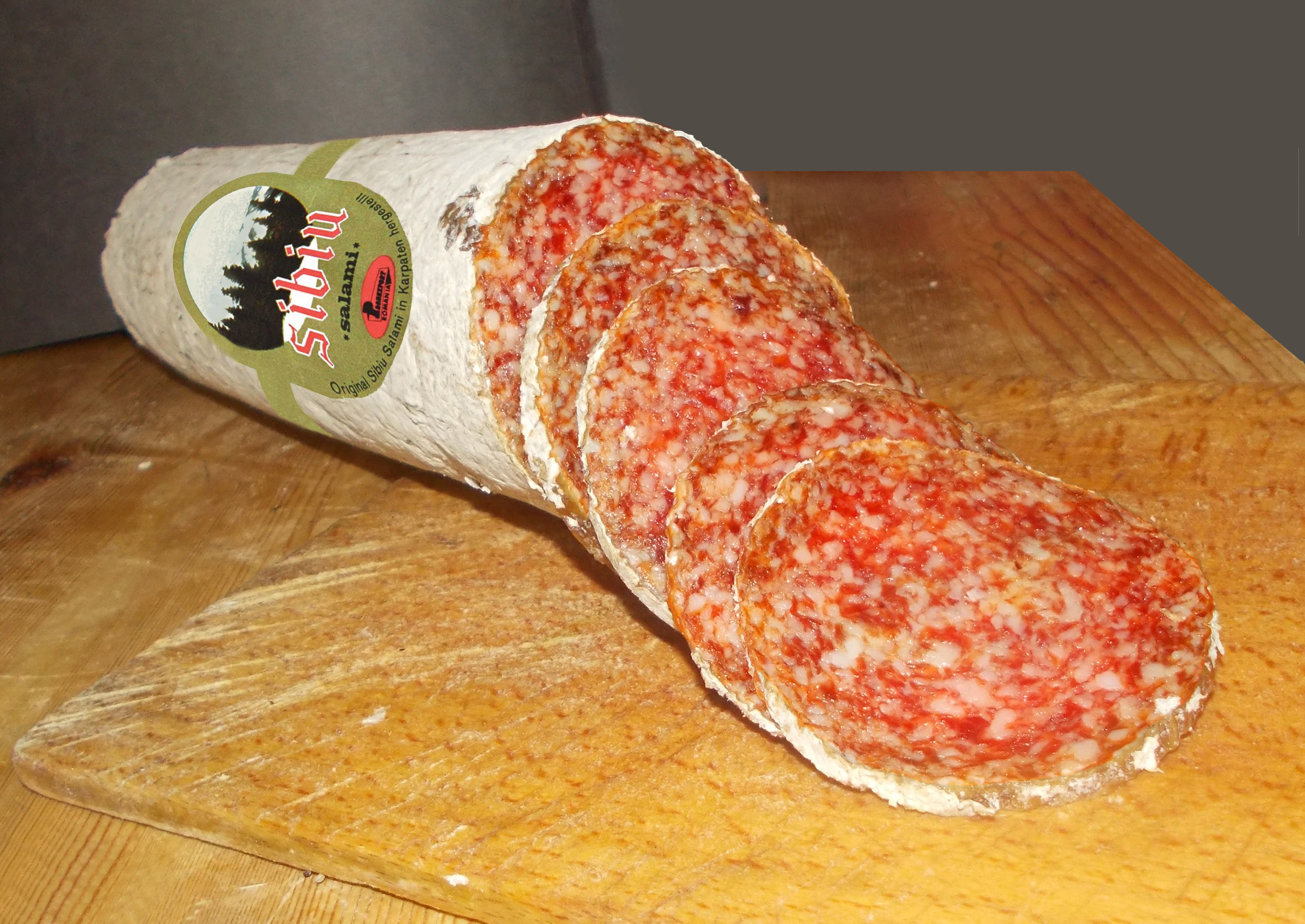 Salami de Sibiu (cuisine roumaine, photo de 1988 par moi-même - rarissime à l'époque)